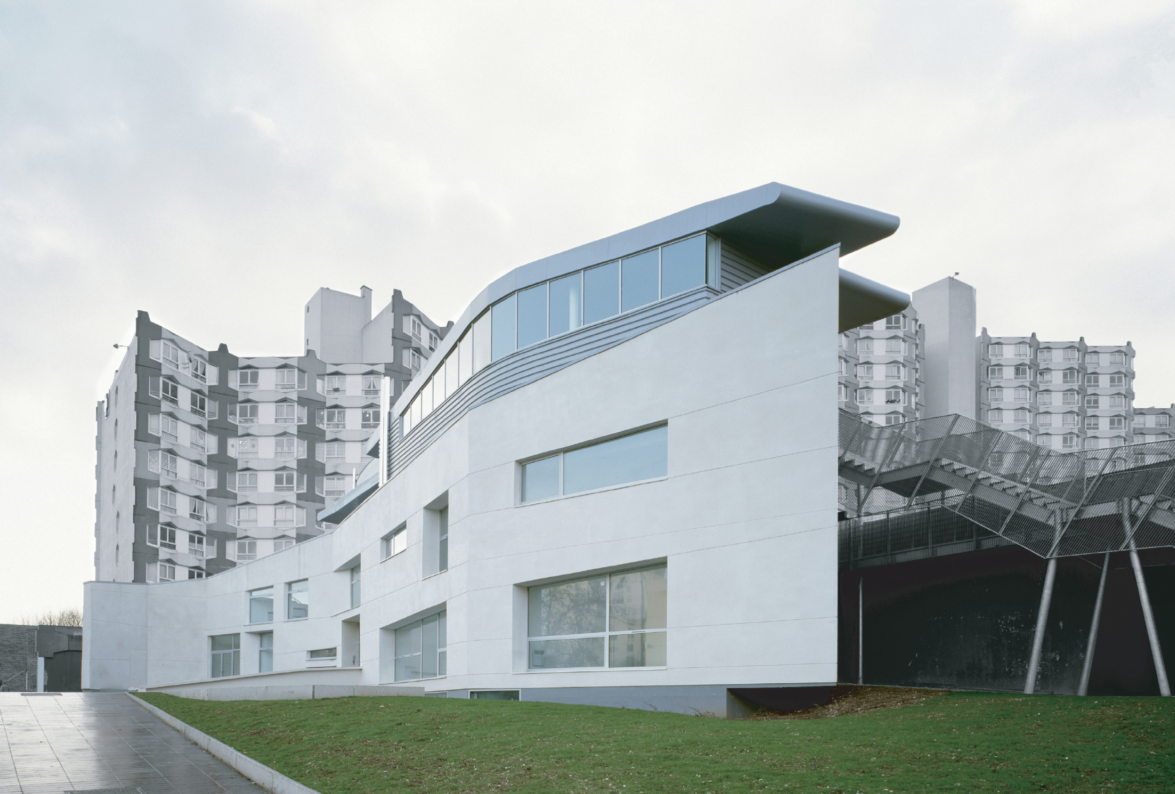 Le Centre Musical s'organise, en ligne brisée, comme un paravent masquant les murs aveugles d'un centre commercial. Avec son kiosque pour concert en plein air, les larges baies de ses salles de solfège et sa cour anglaise, il s'ouvre sans retenue sur la grande esplanade qu'il délimite.